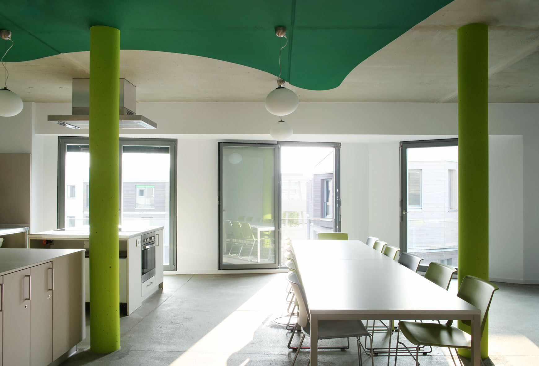 Studentendorf Adlershof, Blick in einen Gemeinschaftsbereich